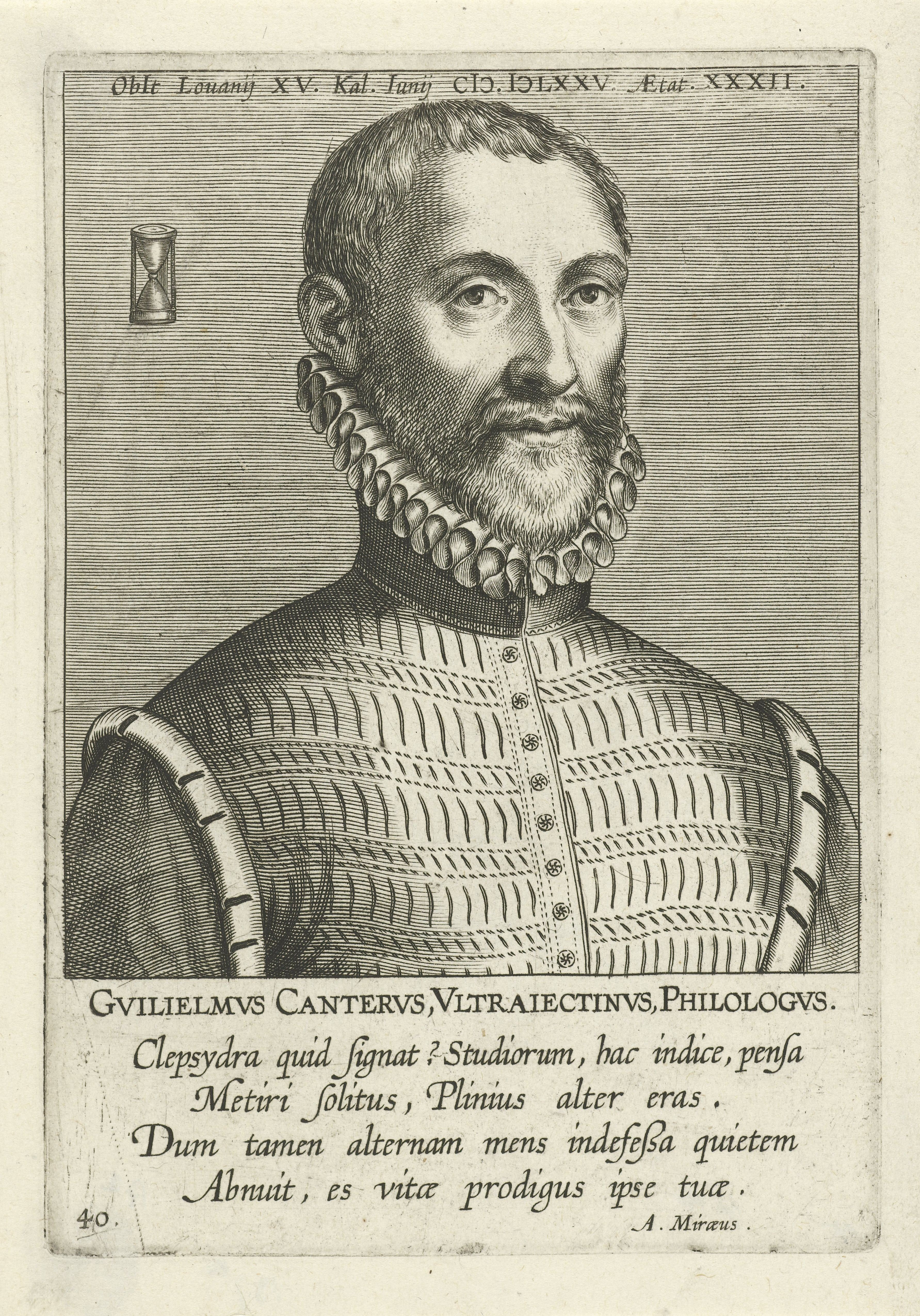 IdentificatieTitel(s): Portret van Willem CanterGuilielmvs Cantervs Vltraiectinvs, Philogvs (titel op object)Portretten van beroemde Nederlandse en Vlaamse geleerden (serietitel)Illustrium Galliae Belgicae scriptorum icones et elogi (serietitel)Objecttype: prent Serienummer: 40/51Objectnummer: RP-P-1906-1484Catalogusreferentie: New Hollstein Dutch fig. 17-1(2)Opschriften / Merken: verzamelaarsmerk, verso midden, gestempeld: Lugt 2228Omschrijving: Portret van Willem Canter, Nederlandse filoloog. Buste naar rechts. Links van zijn hoofd een zandloper. De prent heeft een Latijns boven- en onderschrift en maakt deel uit van een serie van beroemde Nederlandse en Vlaamse geleerden.VervaardigingVervaardiger: prentmaker: Philips Galle (toegeschreven aan atelier van)schrijver: Aubert le Mire (vermeld op object)uitgever: Theodoor Galle (mogelijk)Plaats vervaardiging: AntwerpenDatering: 1604Fysieke kenmerken: gravureMateriaal: papier Techniek: graveren (drukprocedé)Afmetingen: plaatrand: h 160 mm × b 110 mmOnderwerpWat: hourglassWie: Willem CanterVerwerving en rechtenVerwerving: aankoop 1906Copyright: Publiek domein